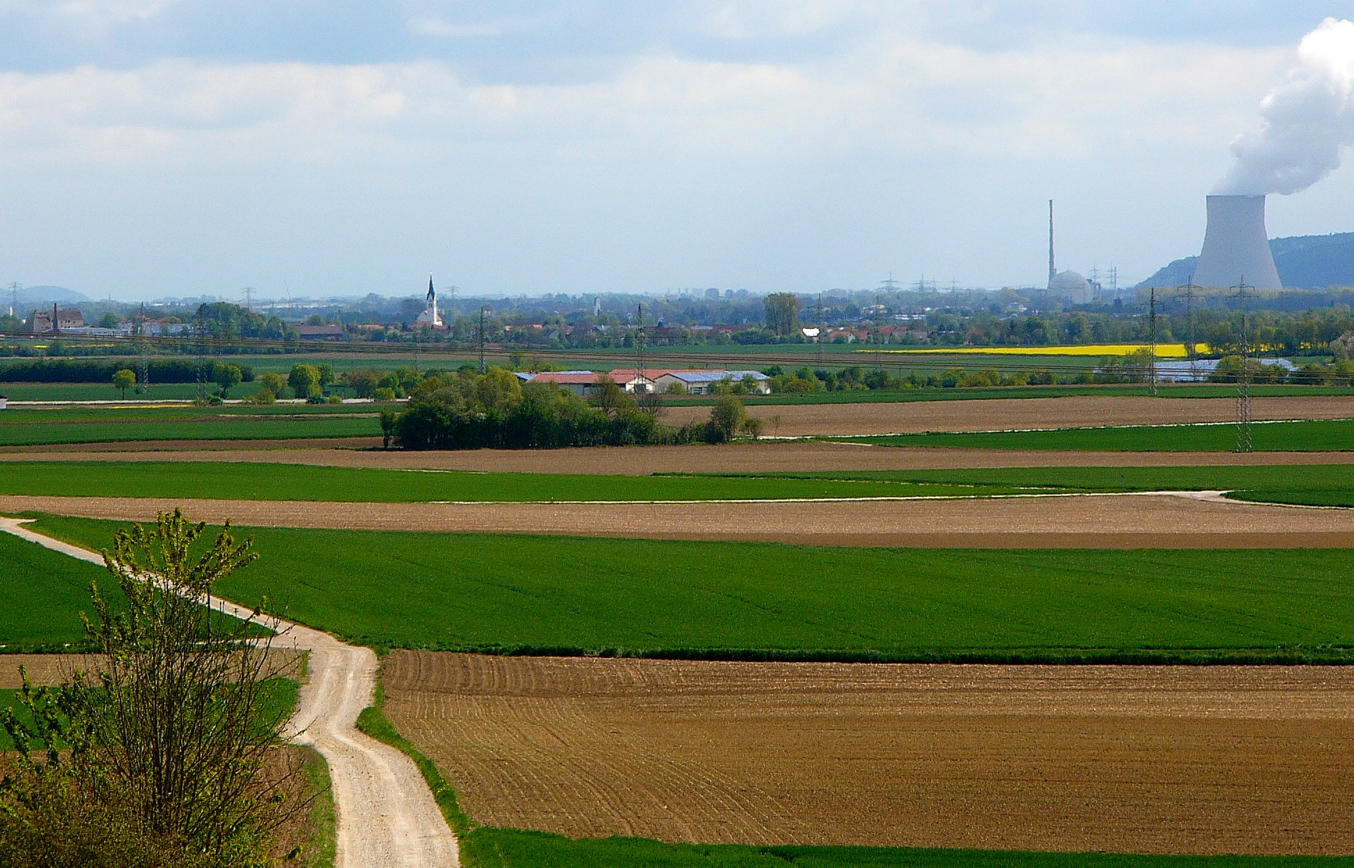 Altheim bei Essenbach, Kreis Landshut, von Klosterholz aus gesehen.